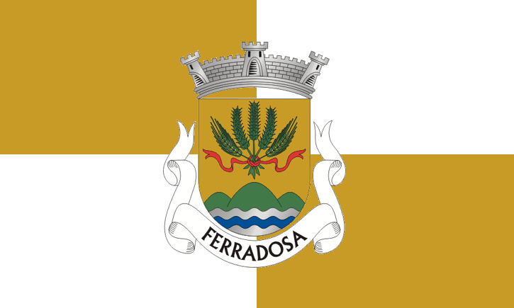 Bandera de la freguesia.